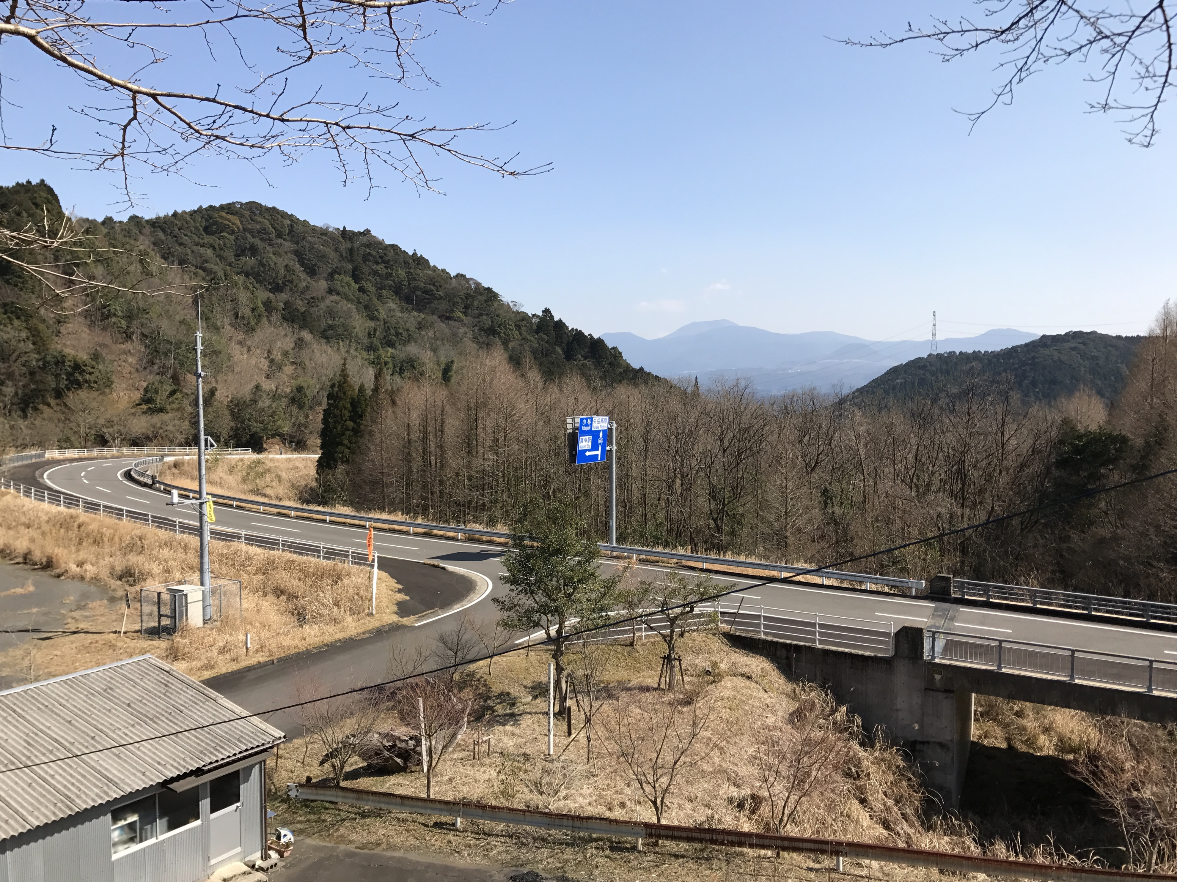 真幸駅の駅前風景